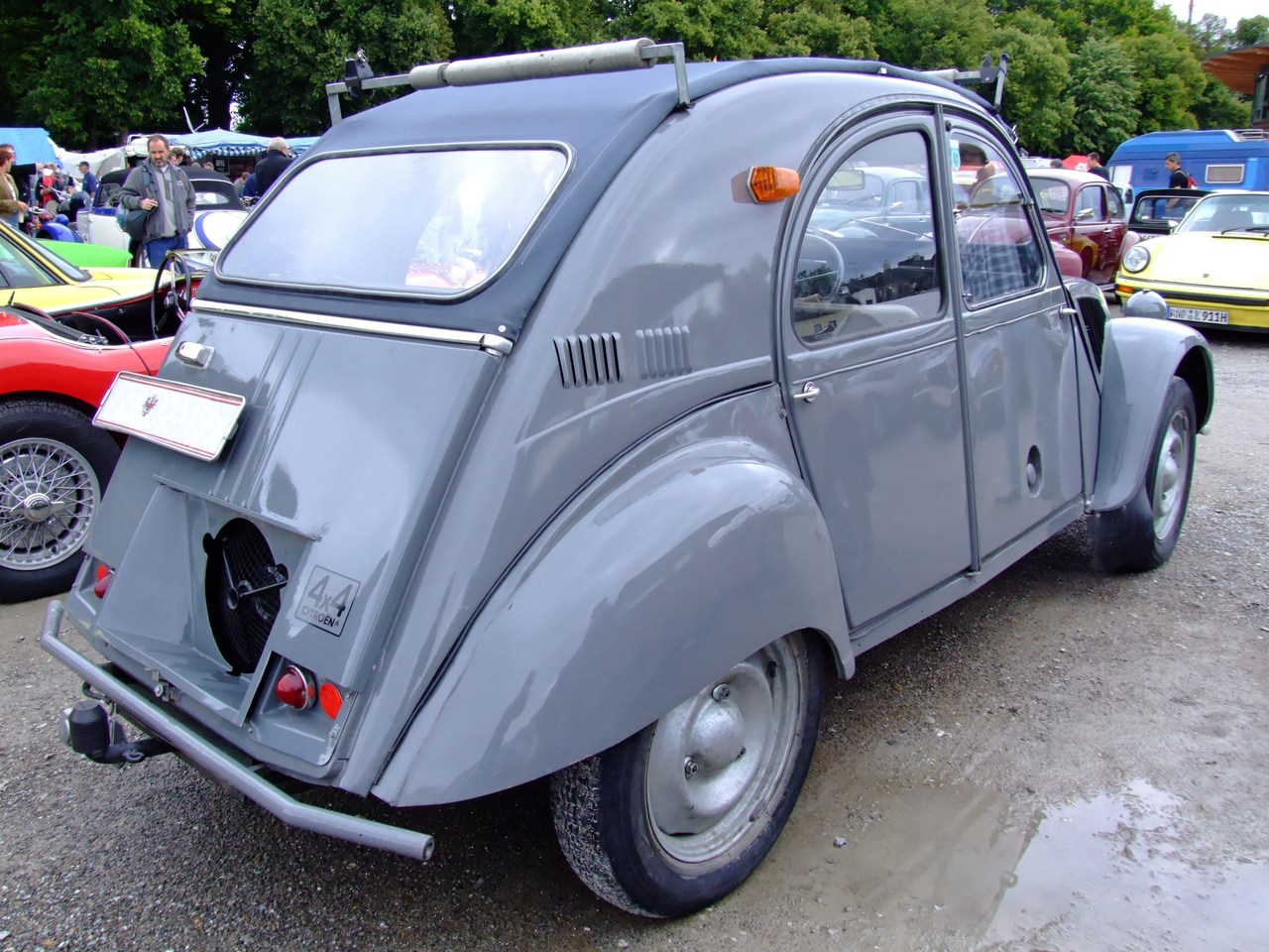 Quelle: selbst fotografiert, 07/2007 Fotograf: Späth Chr.